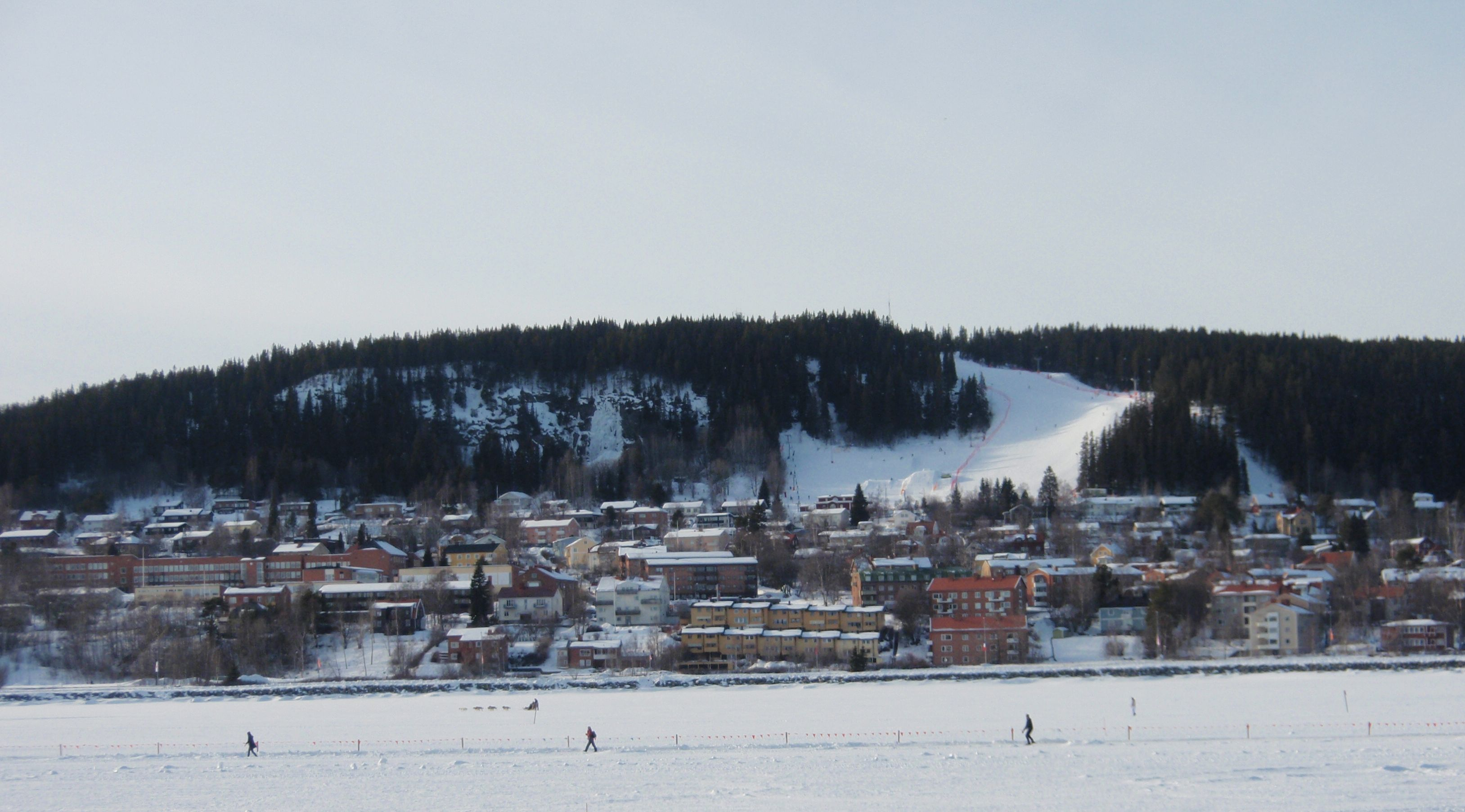 Frösön och Gustavsbergsbacken från Östersundssidan